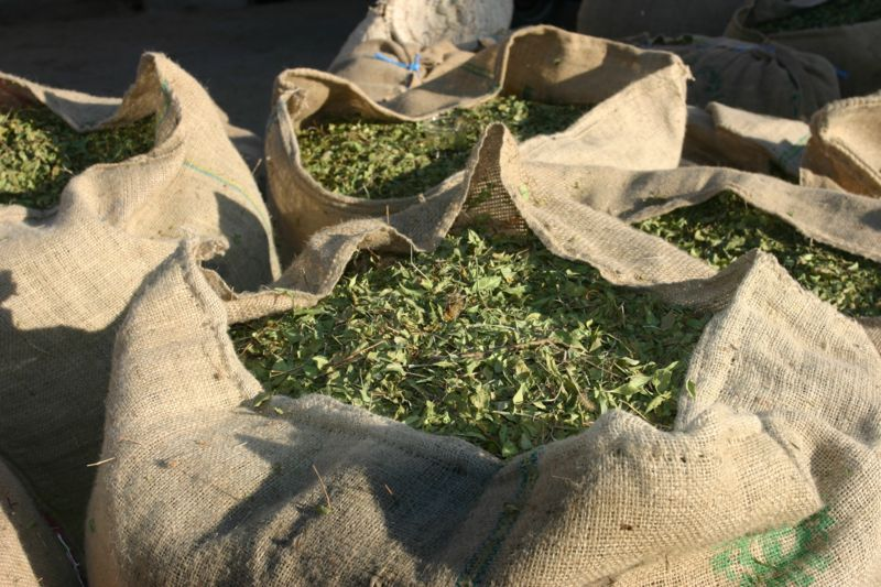 Photographie personnelle prise en décembre 2004, représentant un sac de henné séché au marché de Gabès, plante emblématique de la ville et de l'oasis, servant notamment à la teinture et à la fortification de la chevelure féminine ainsi qu'aux tatouages lors de cérémonies de mariage traditionnelles.